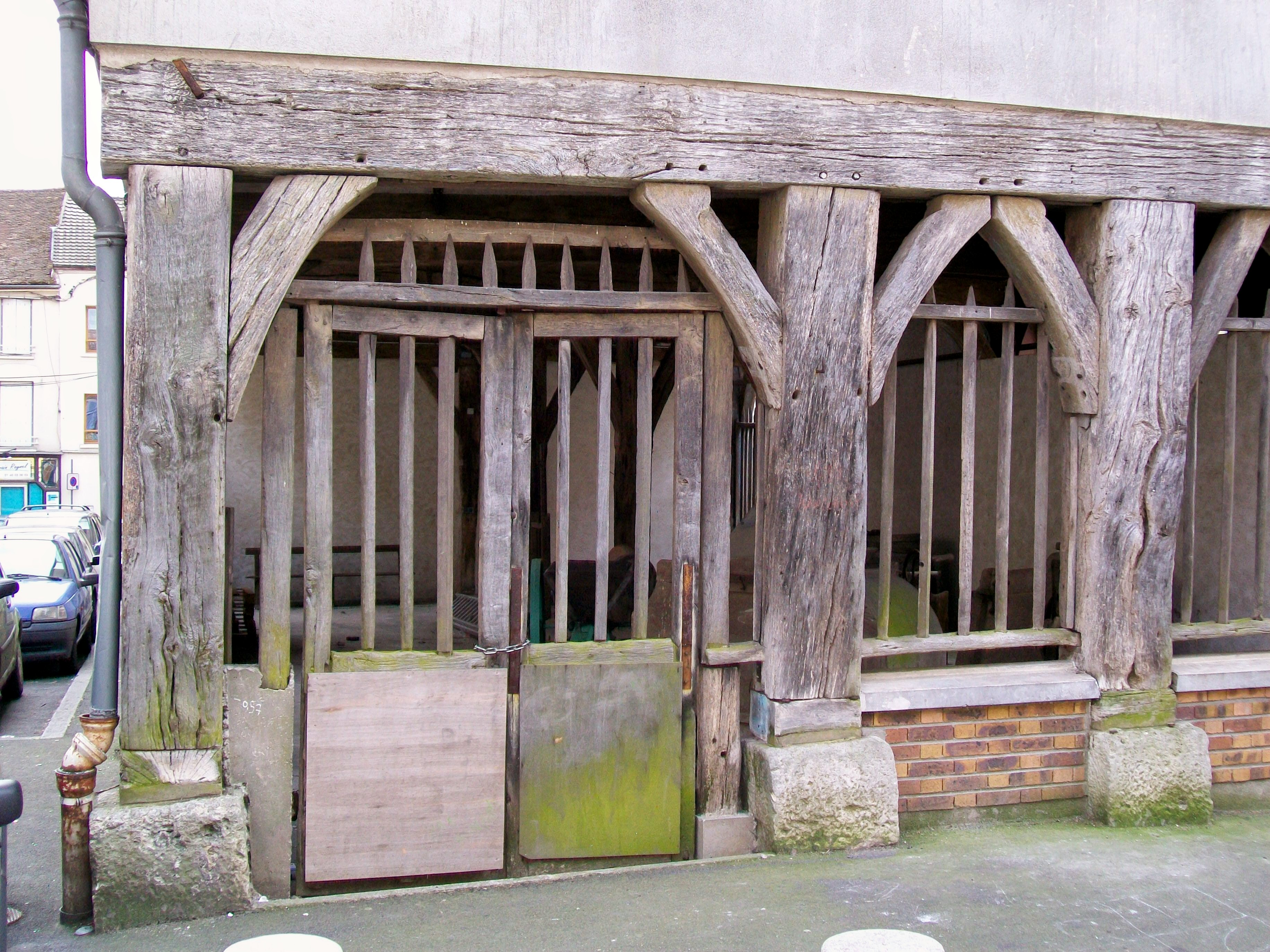 Halle médiévale derrière la mairie, vue de détail.